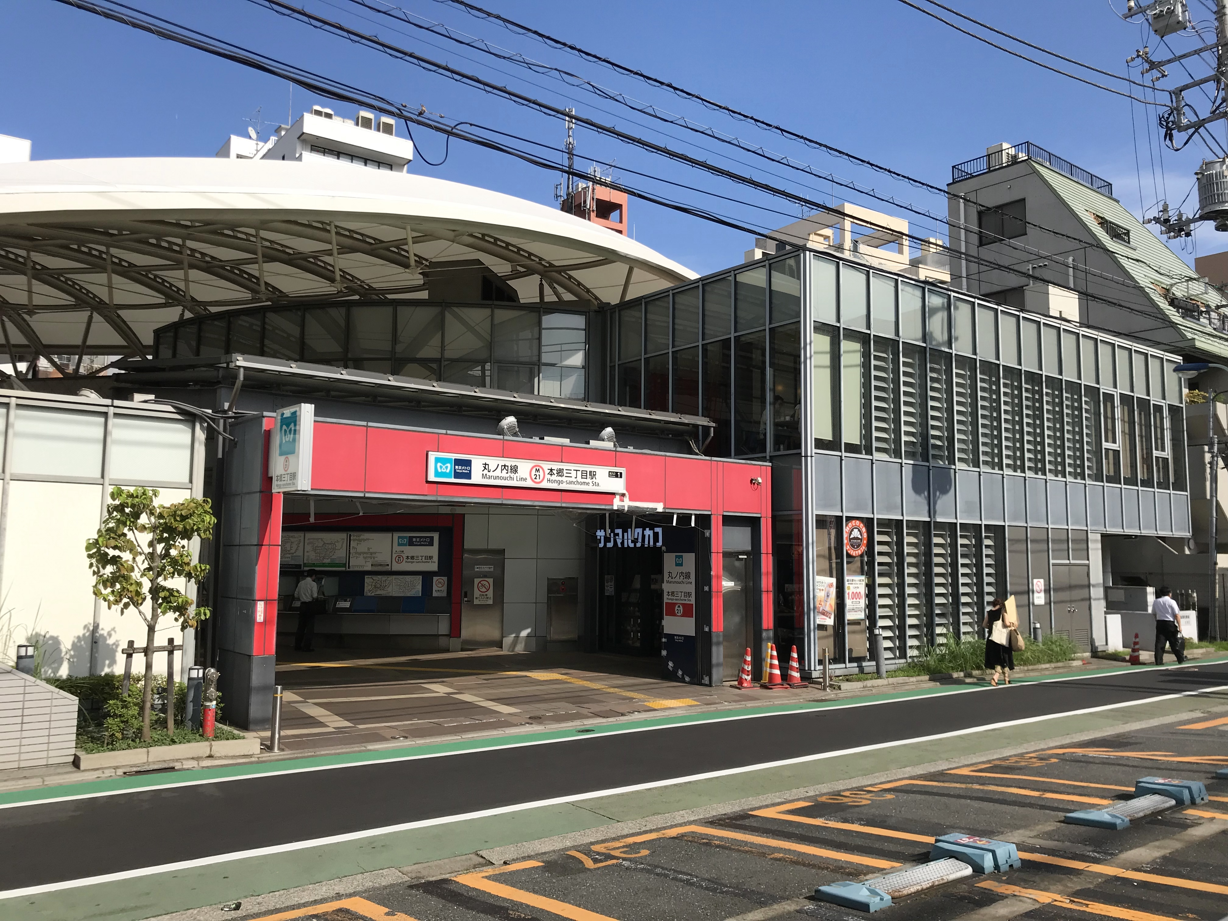 東京メトロ丸ノ内線本郷三丁目駅1番出入口